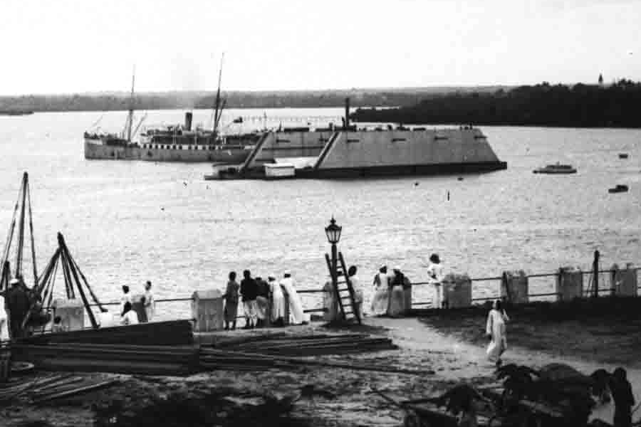 Das deutsches Schwimmdock im Hafen Daressalam von der Zollbrücke aus gesehen.